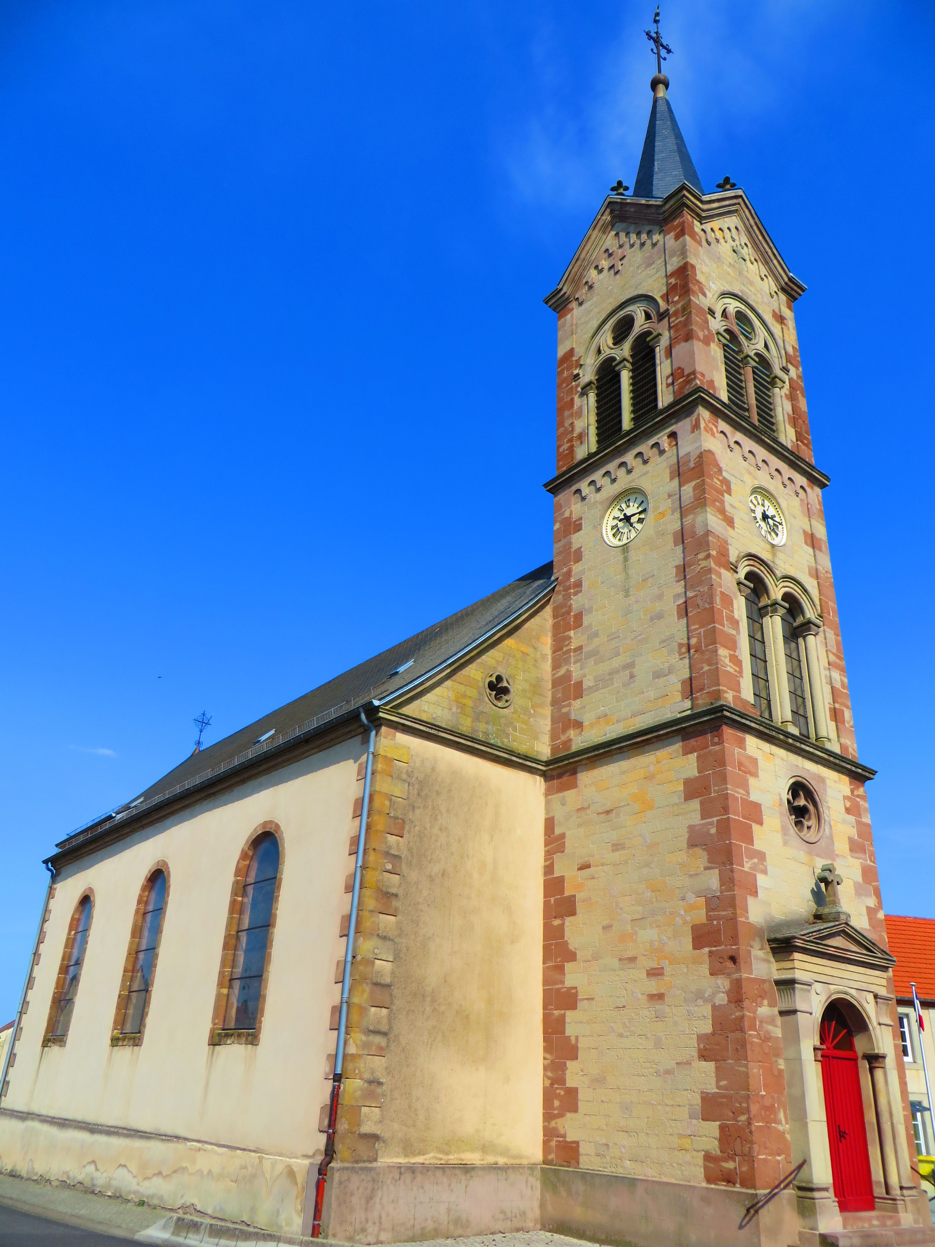 Cappel eglise